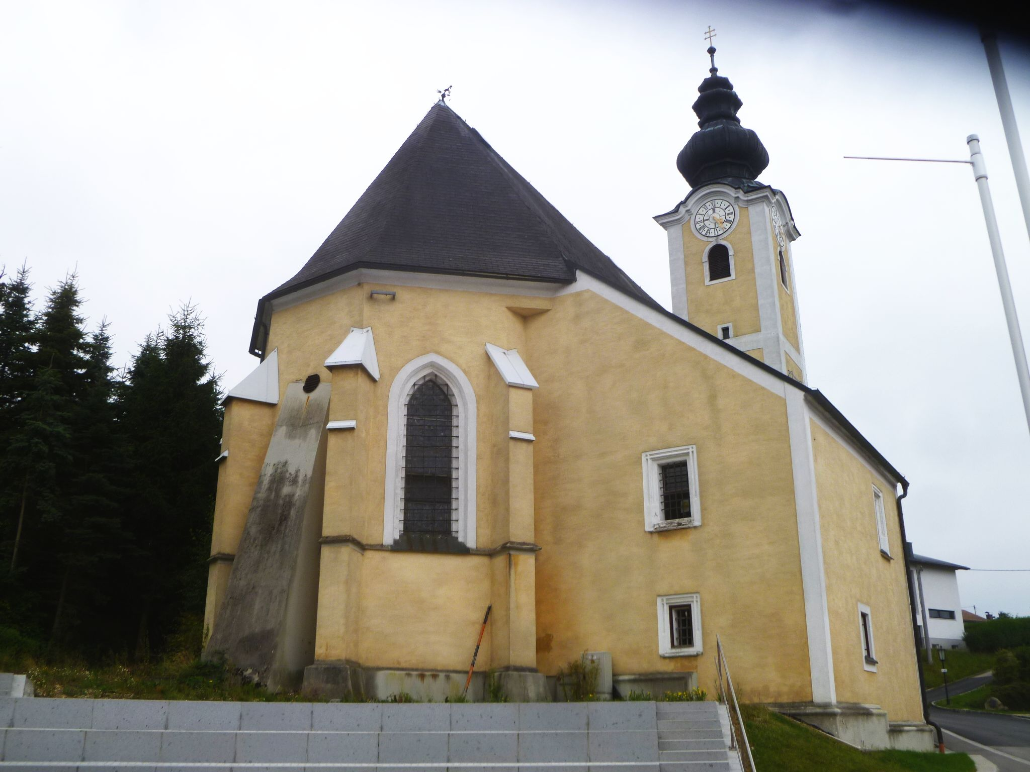 Kath. Pfarrkirche hl. Leonhard